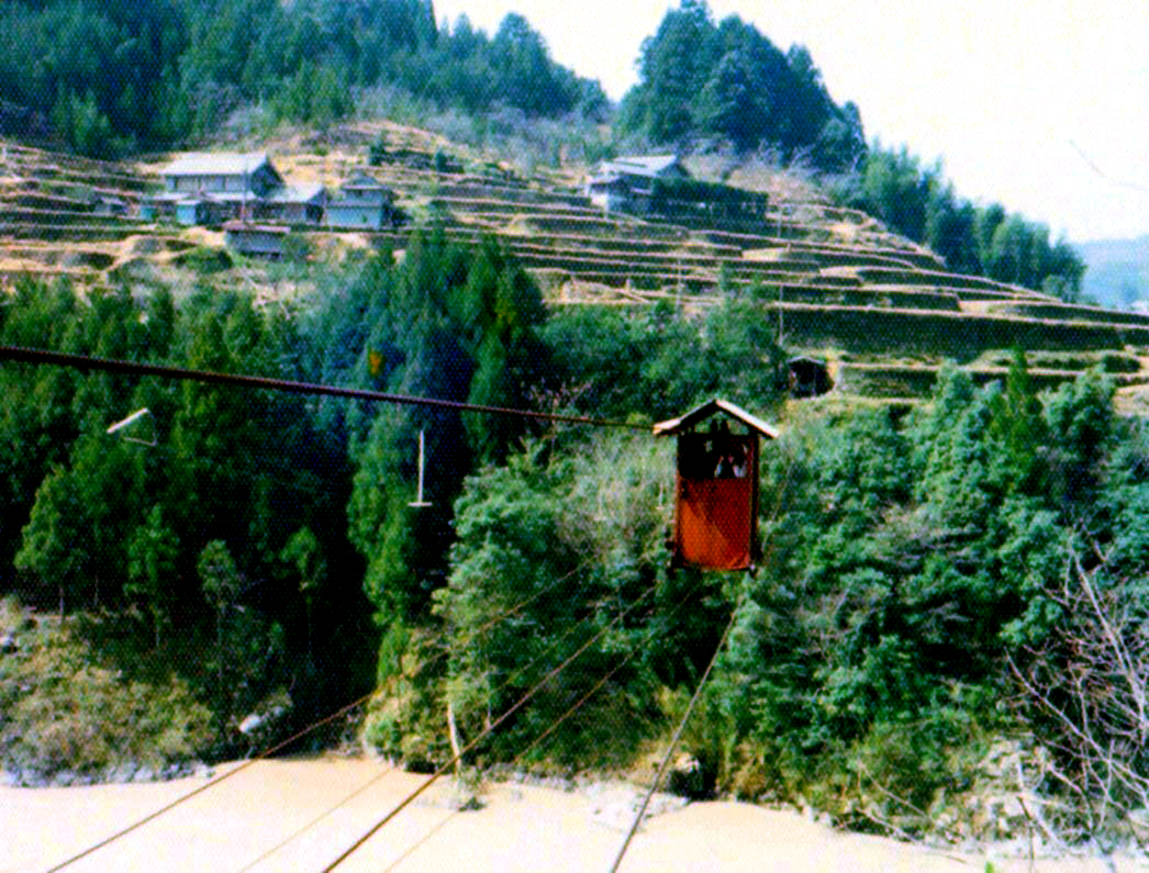 徳島県ja:那賀郡ja:相生町（現ja:那賀町）にあった「川浦の吊船」。野猿タイプの索道であったが、鉄製で内部には自転車と同様のサドルやペダルがあった。1999年まで存在したという。ja:1972年3月27日にBergmannが銀塩フィルムカメラで撮影したものを、2010年5月31日に同人がスキャンし、同日に日本語版ウィキペディアへアップロード。